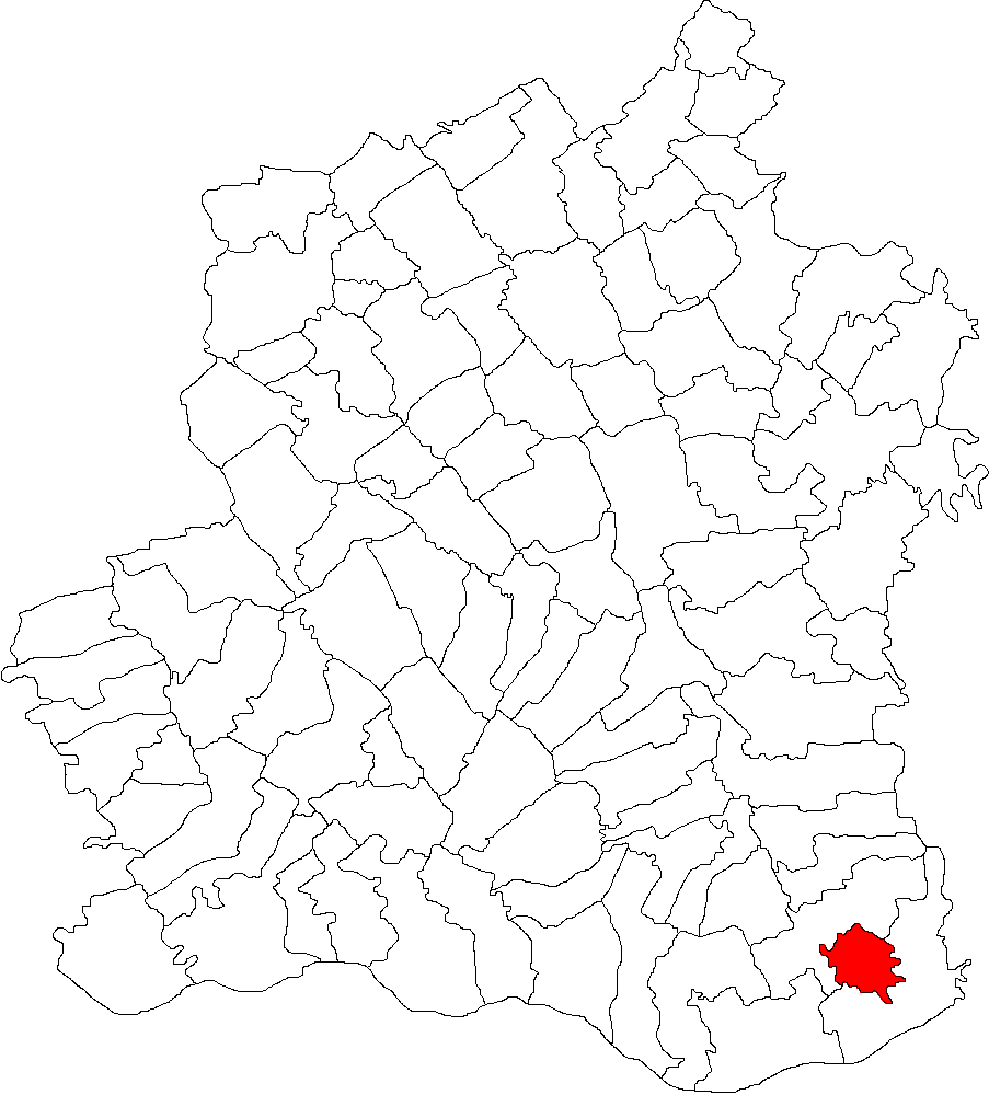 Categorie:Hărţi ale judeţului Teleorman